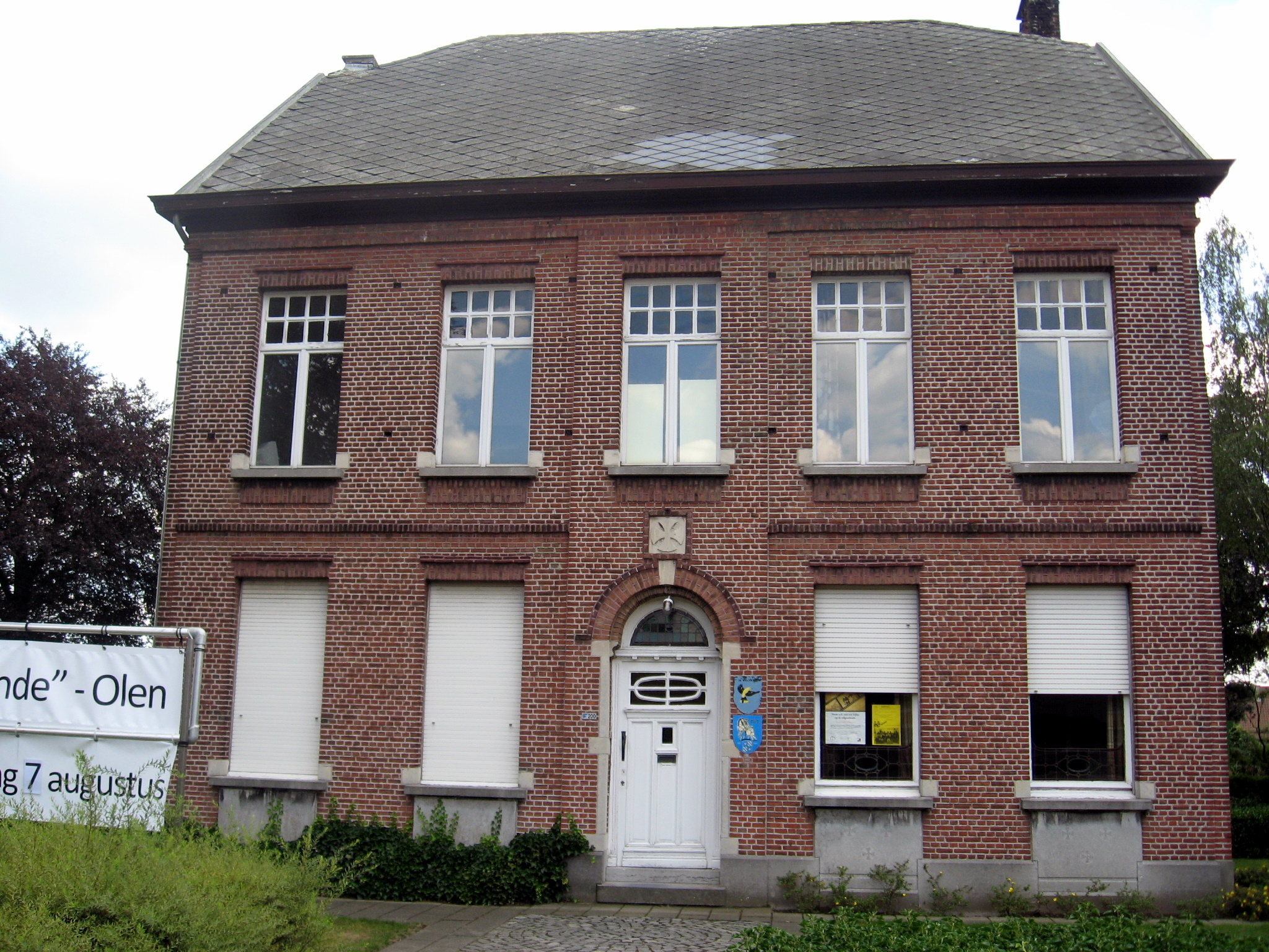 Voormalige pastorie van de Sint-Jozefparochie, dubbelhuis, in Olen